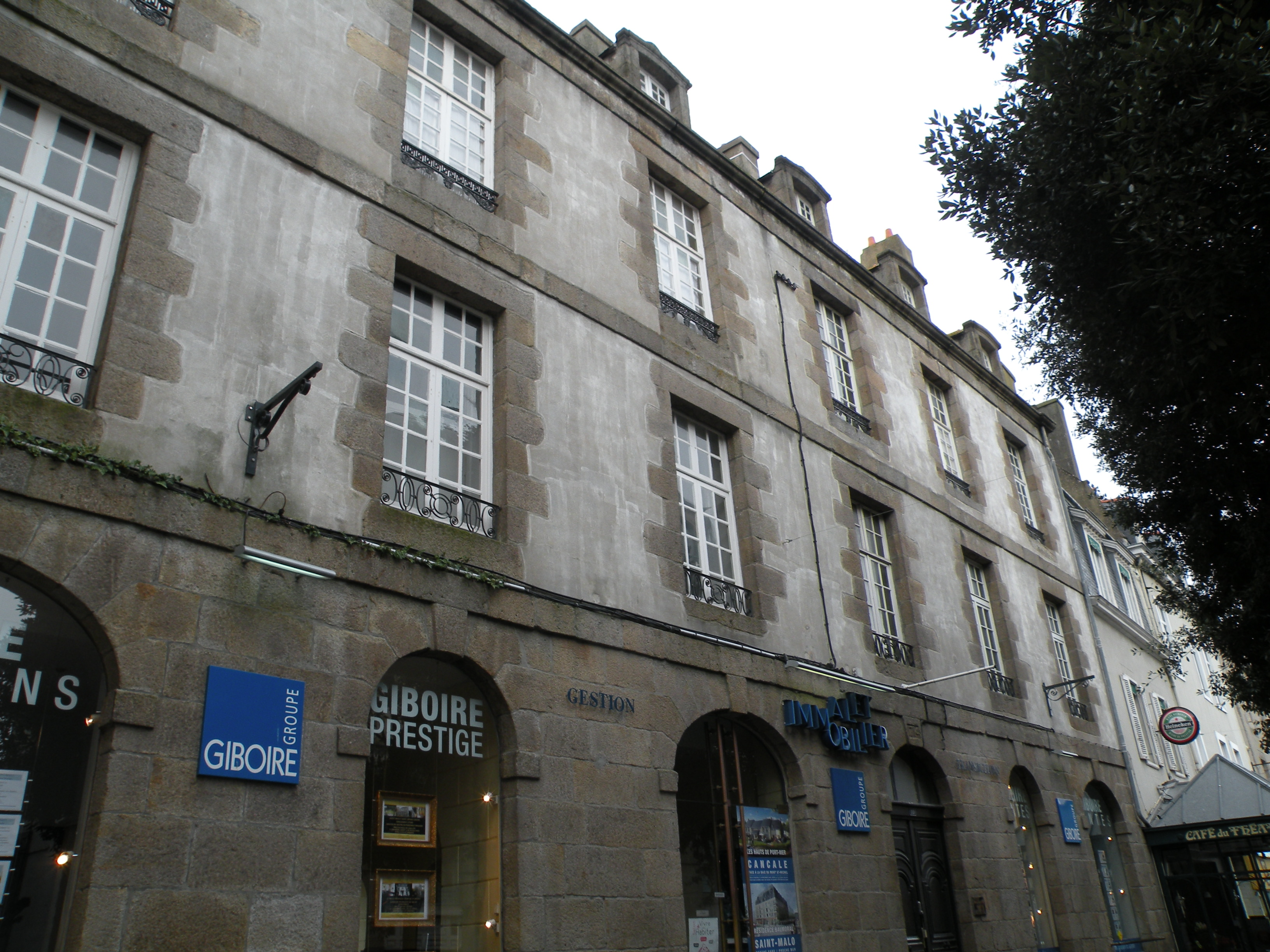 Hôtel du Pélican, 8-10 rue Ville-Pépin à Saint-Malo.